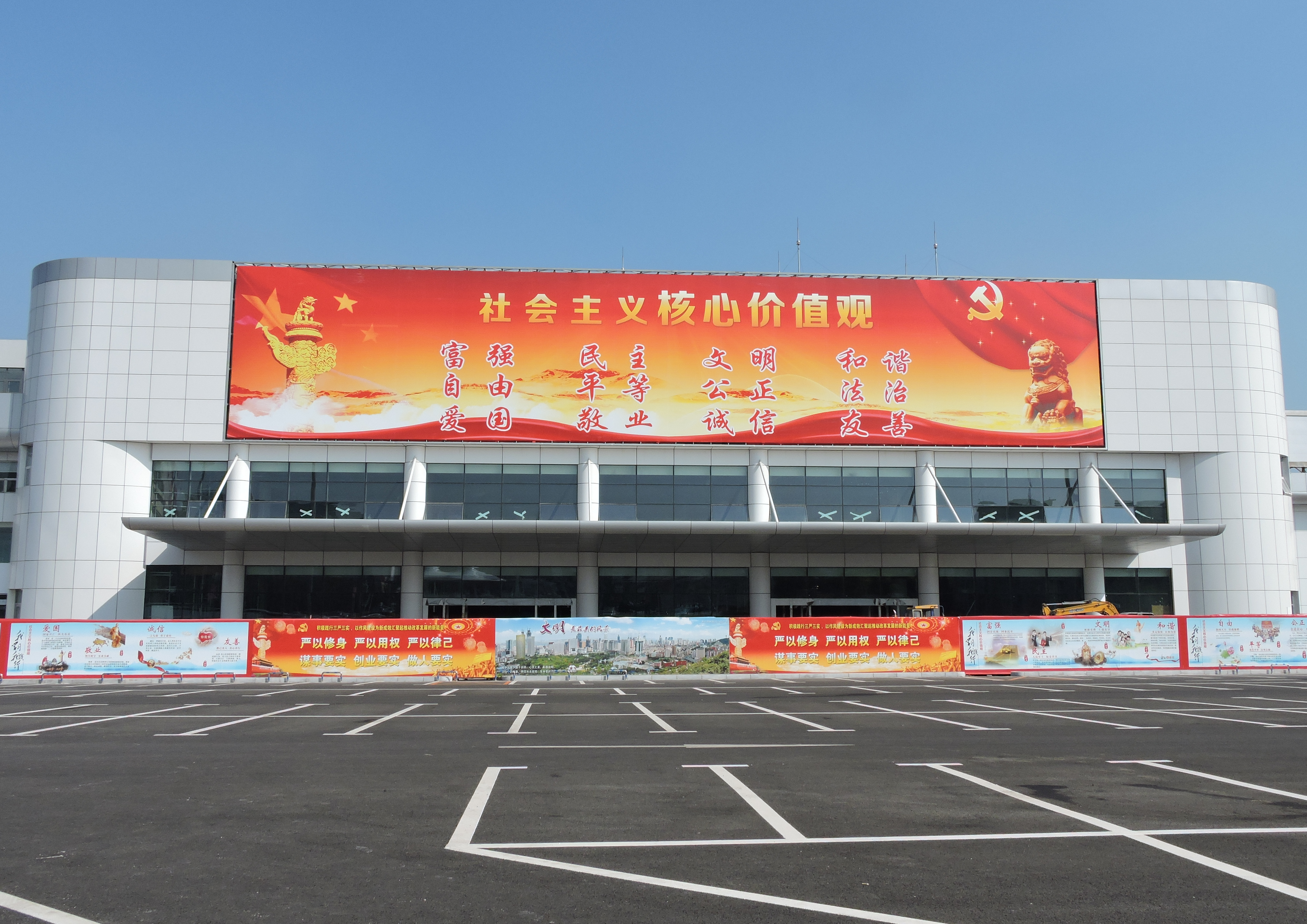 社会主義核心価値観